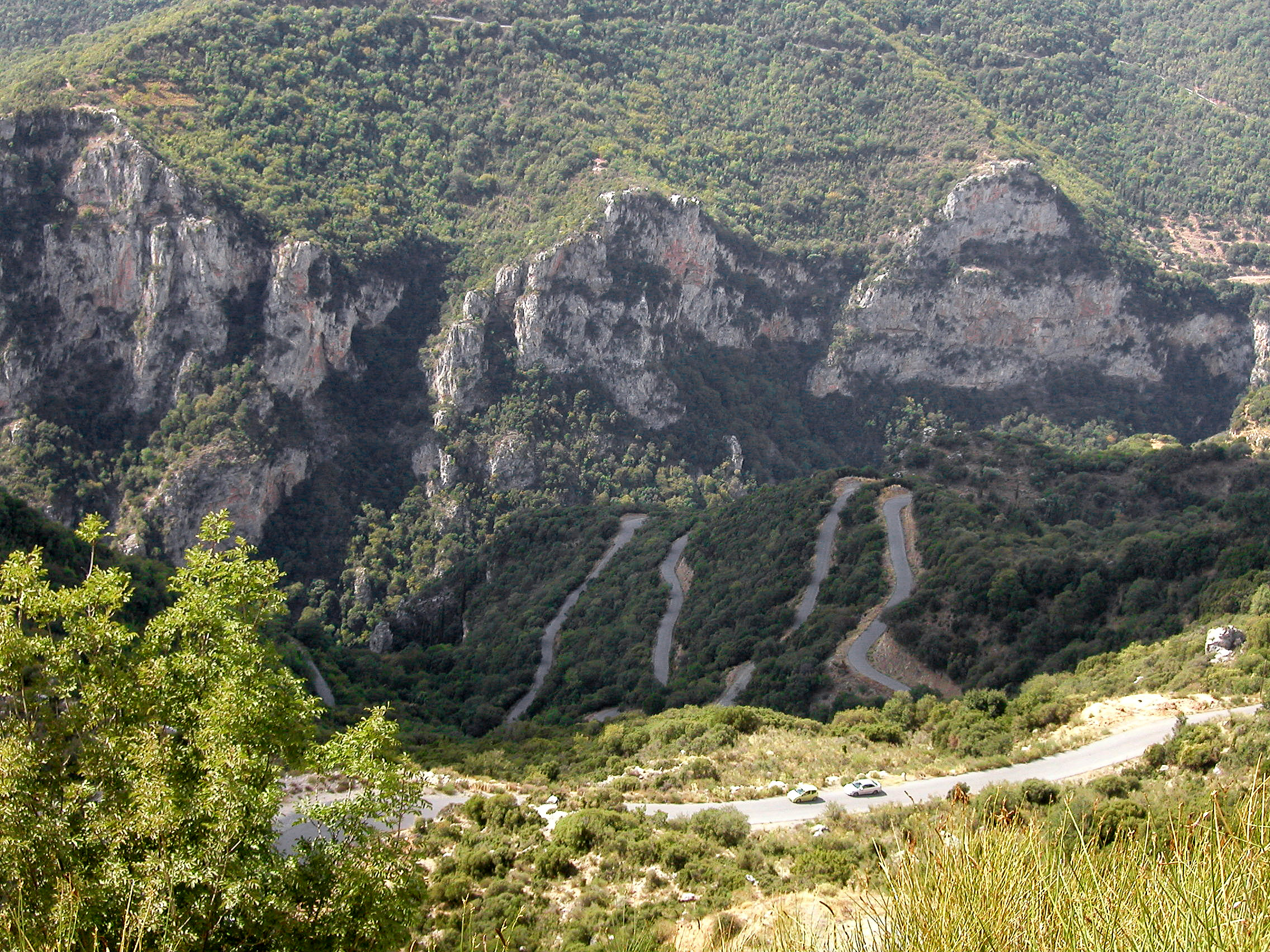 Lousios-Schlucht / -gorge